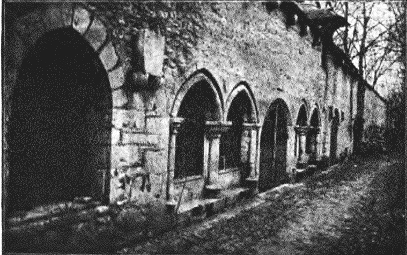 Partie subsistante du cloître de l'abbaye Notre-Dame de l'Eau (XIIIe siècle), photographie, vers 1906.